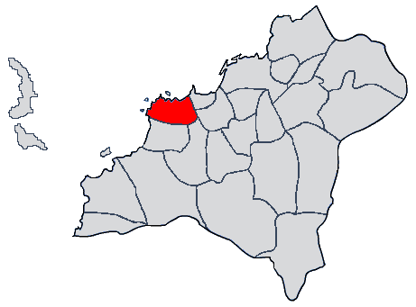 Mapa coa localización da parroquia de Alcabre, Vigo (Galiza)